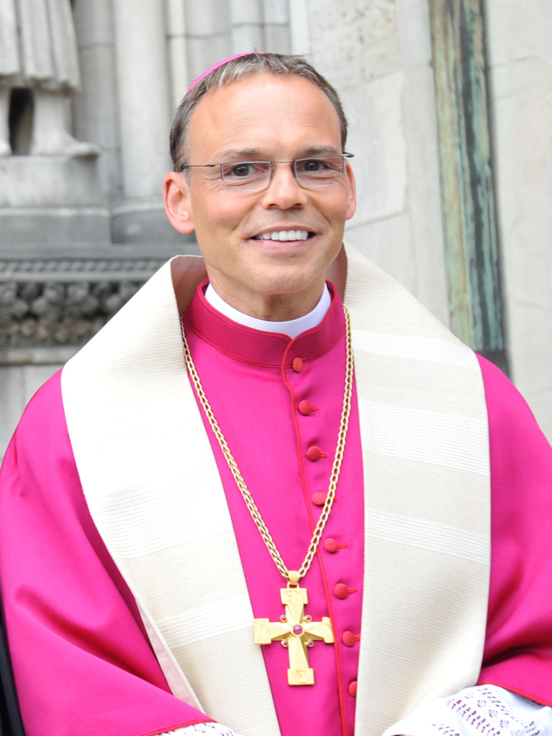 Der Limburger Bischof Franz-Peter Tebartz-van Elst am 1. Juni 2012 beim Ökumenischen Gottesdienst beim "Hessentag" im Dom von Wetzlar